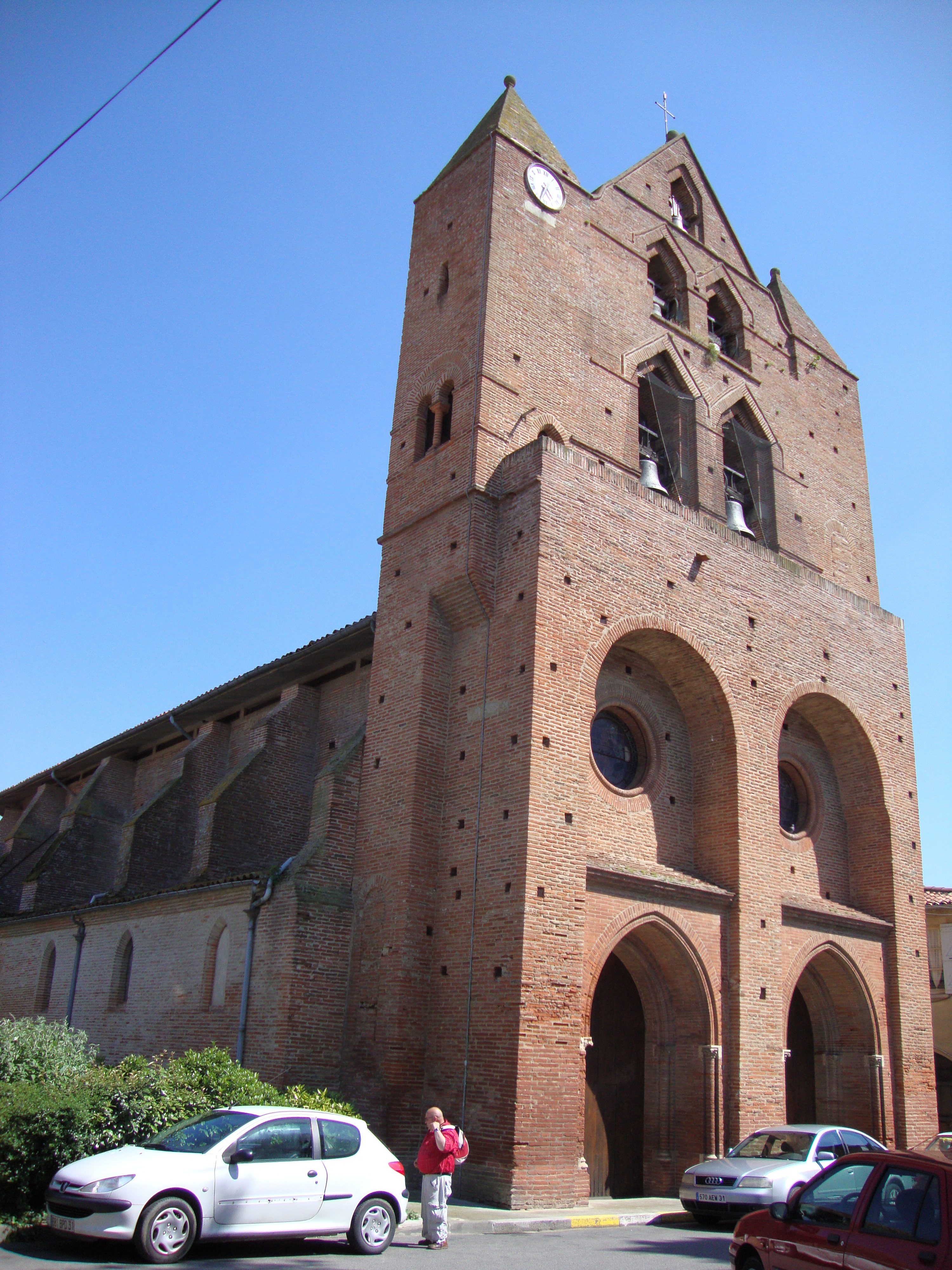 Baziège (Haute-Garonne, Fr) église de style toulousain